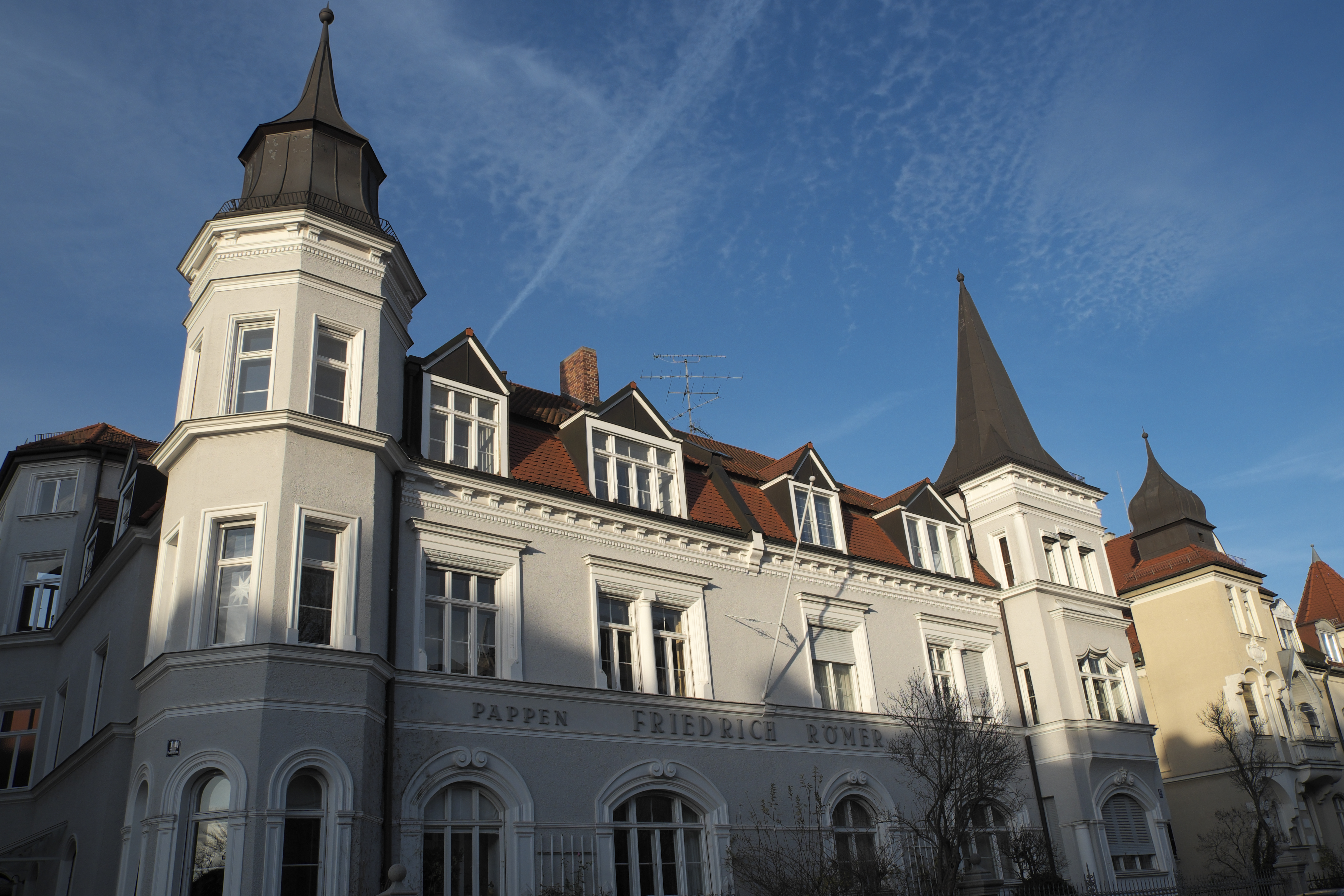 Mietshaus in der Bothmerstraße 11/13 in Neuhausen im Stadtbezirk Neuhausen-Nymphenburg in München (Bayern/Deutschland)